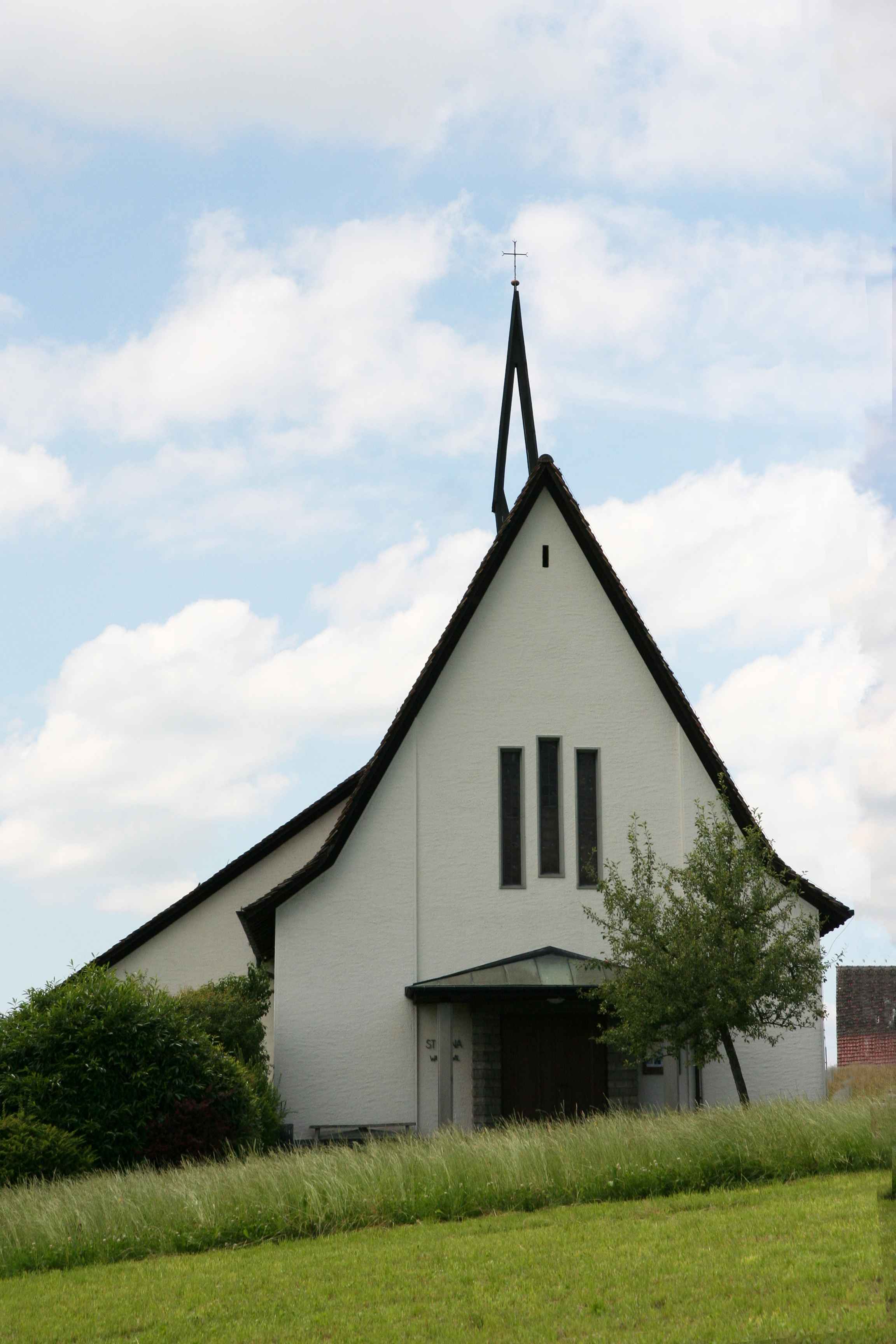 Römisch-katholische Kapelle St. Anna Wädenswil, Frontseite